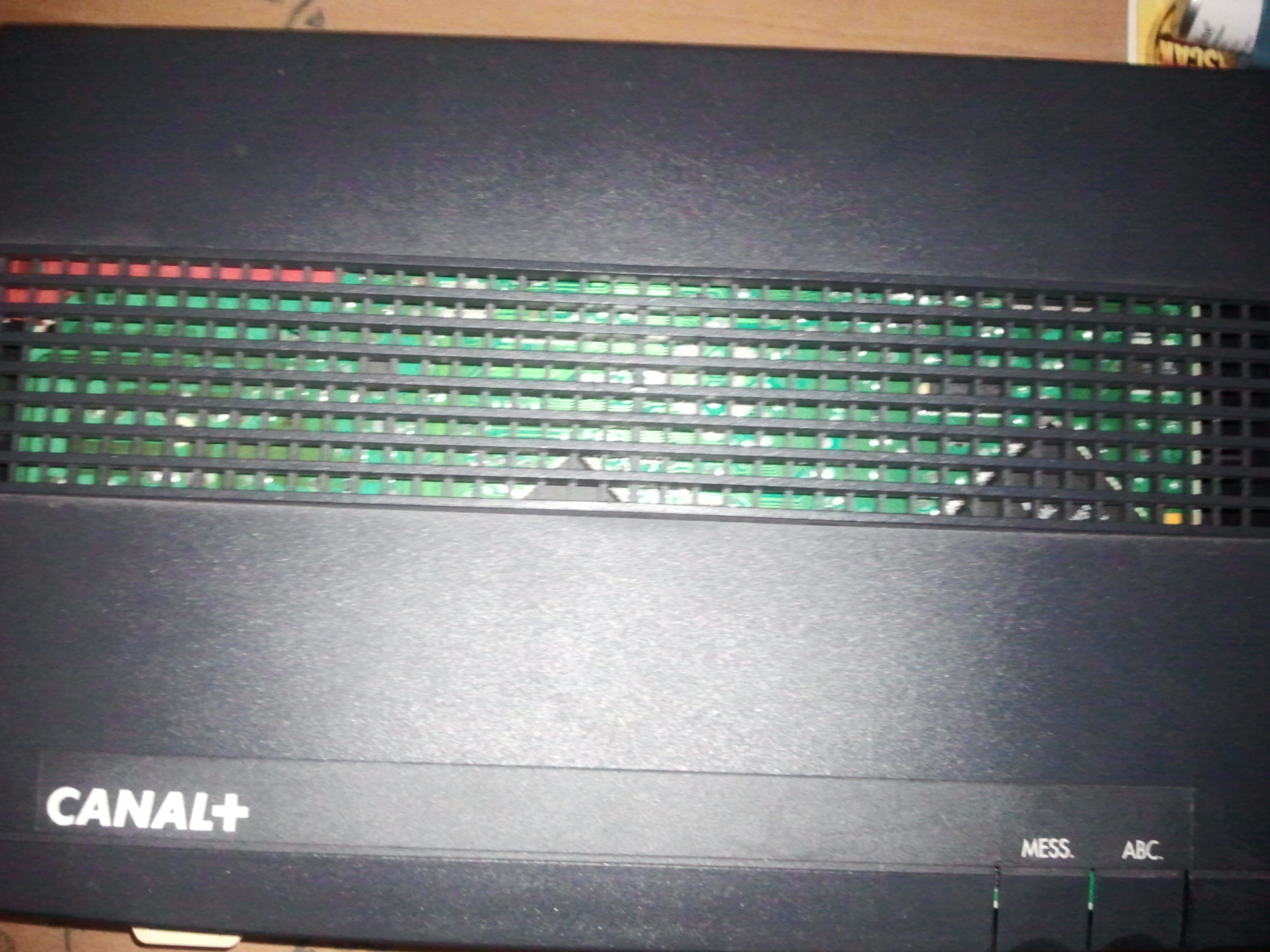 Ancien Décodeur Canal + ancienne génération